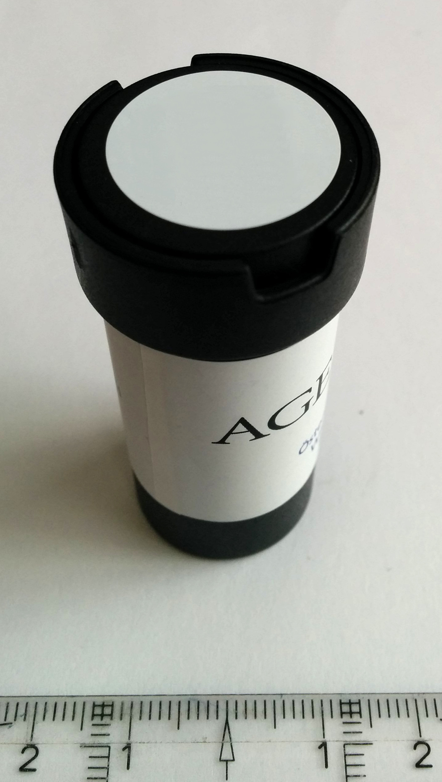 Kernspurdetektor für die Radonmessung (Messröhrchen) im Rahmen der Radonmessung